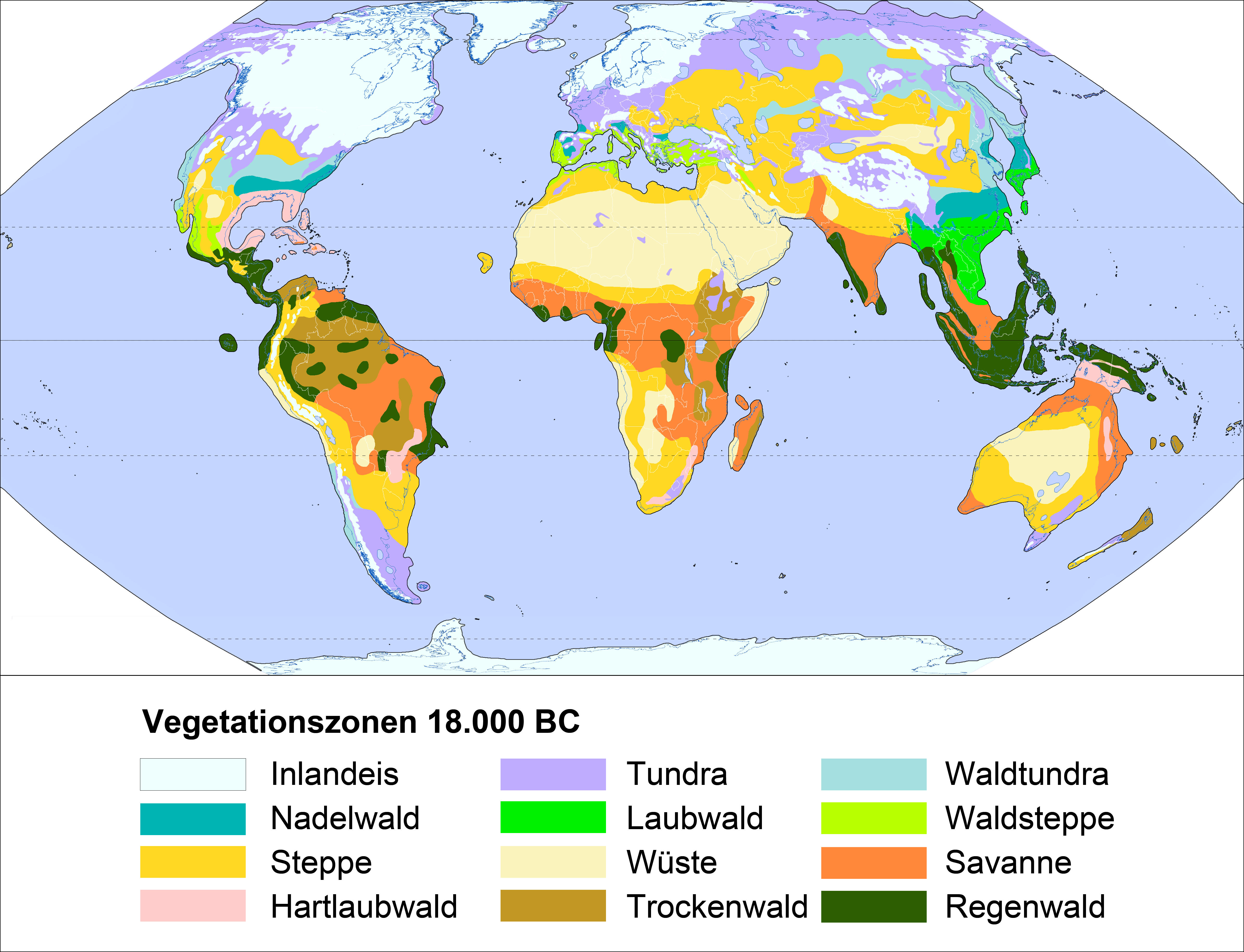 Grundlagen Eisbedeckung Jürgen Ehlers, Philip Gibbard, Paul Hughes: Quaternary Glaciations - Extent and Chronology, Volume 15, 1. Auflage, Elsevier, Amsterdam 2011, ISNB: 978-0-444-53447-7, abgerufen am 29. Dezember 2019. Online-Karten: Quaternary glaciations. Vegetationszonen Welt außer Europa: Peter Claus Hartmann und Ernst Bruckmüller: Putzger historischer Weltatlas, völlig neu bearbeitete 104. Auflage, Cornelsen, Berlin 2011, ISBN 978-3-464-63972-6. S. 18, Karte: Natürliche Vegetation auf der Erde vor 18000 Jahren (2011). Differenzierung außertropischer Wälder und tropischer Trockenwälder/Savannen nach Hartmann u. Bruckmüller: Herbert Liedtke (Verantw.): Themenkarte, Westermann Kartographie (Hrsg.): Diercke Weltatlas. 1. Auflage 2008, Bildungshaus Schulbuchverlage, Braunschweig 2009, ISBN 978-3-14-100700-8. S. 236 unten: Vegetation vor 18.000 Jahren. Europa komplett: ebenda, S. 79 oben rechts: Würm-/Weichseleiszeit (letzte Eiszeit) – Vergletscherung. weitere Ergänzungen / Details / Abgleich Anpassung an reale Gebirgsformen: Westermann Kartographie: "Diercke Weltatlas", 1. Auflage 2008, Bildungshaus Schulbuchverlage, Braunschweig 2009. ISBN 978-3-14-100700-8 -und- Shuttle Radar Topography Mission, Nasa - 2000 in [ maps-for-free], public domain